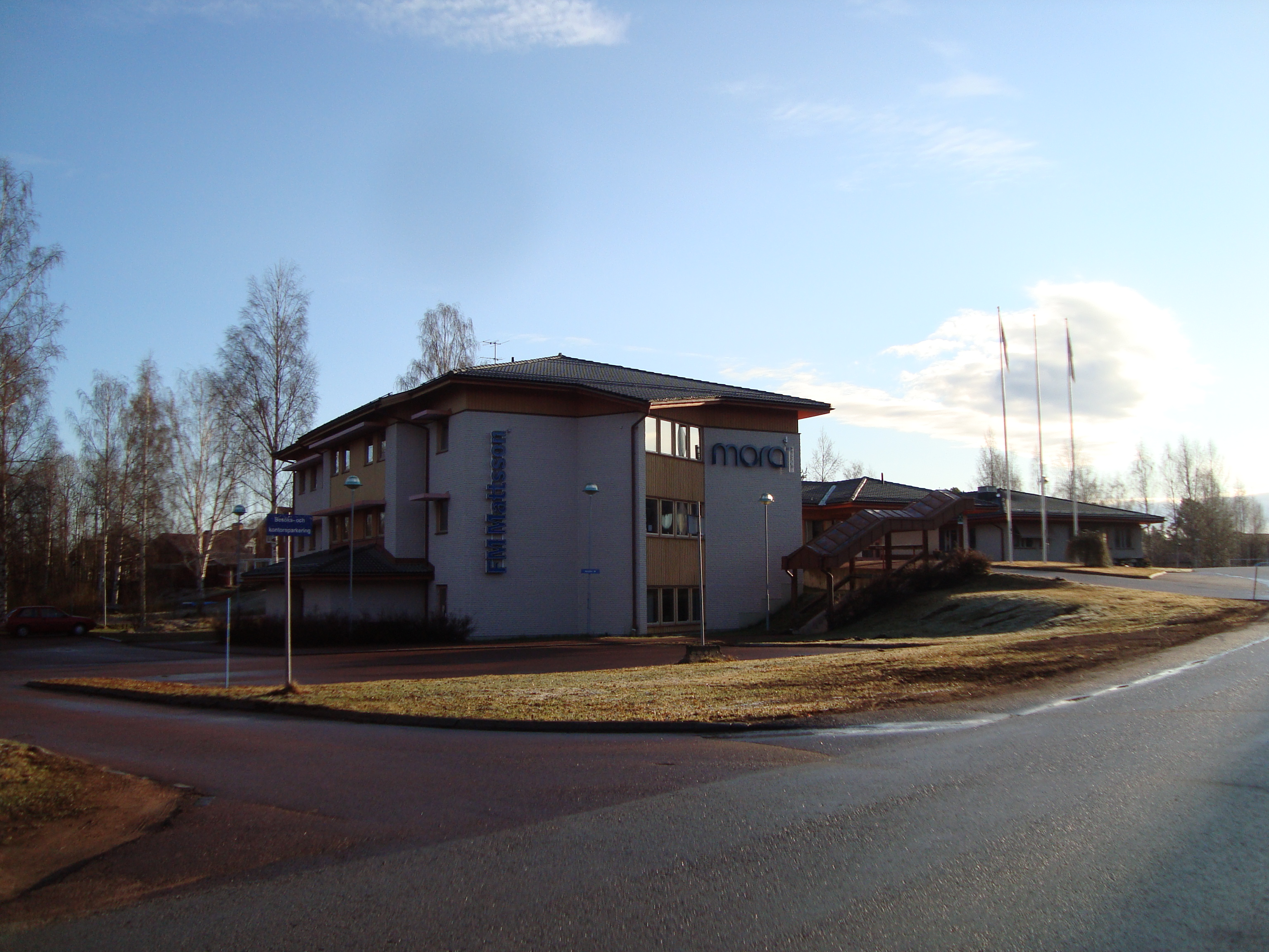 Ostnors kontor, Östnor, Mora kommun, Sverige